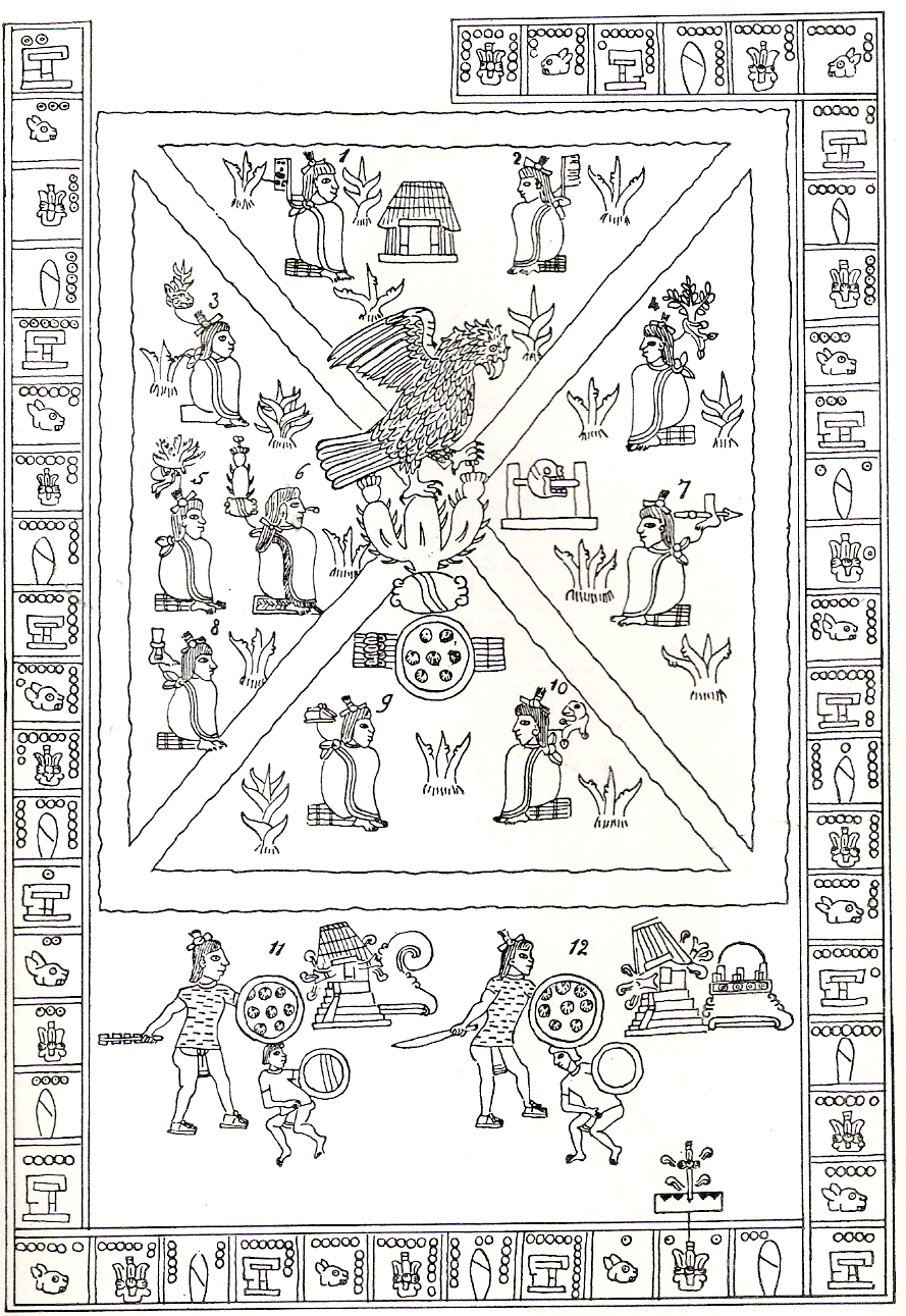 Fundación de México-Tenochtitlan, según el Códice Mendocino